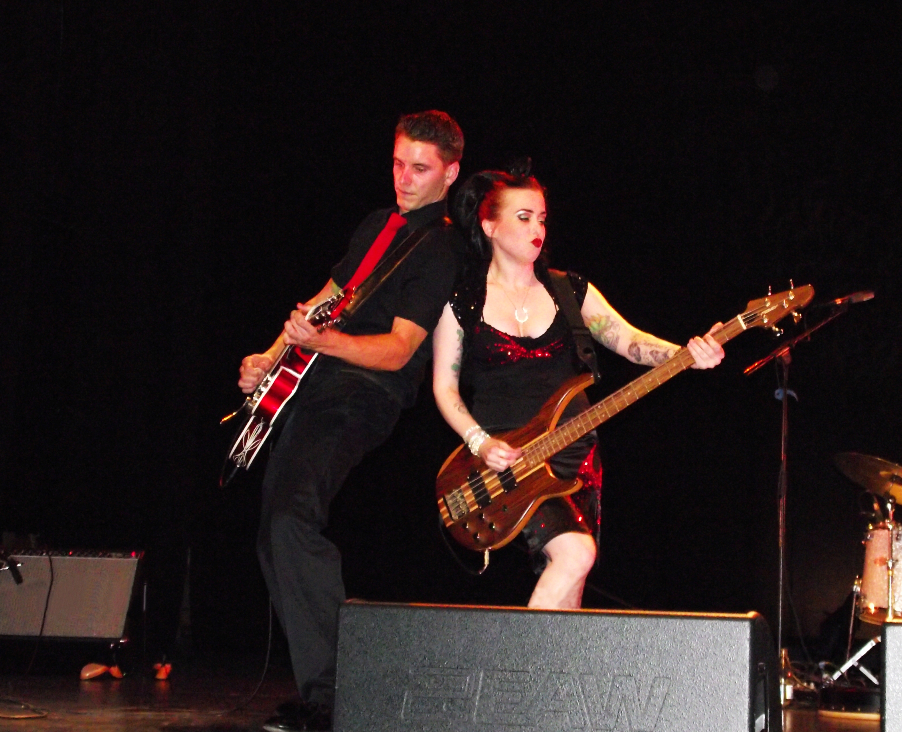 Grupo Devil Doll.